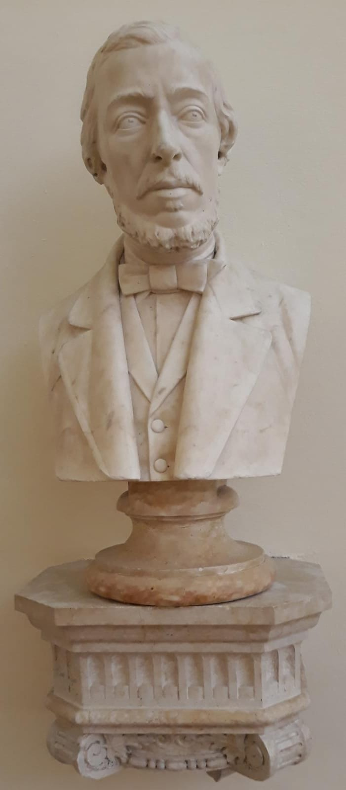 Busto di Abramo Massalongo